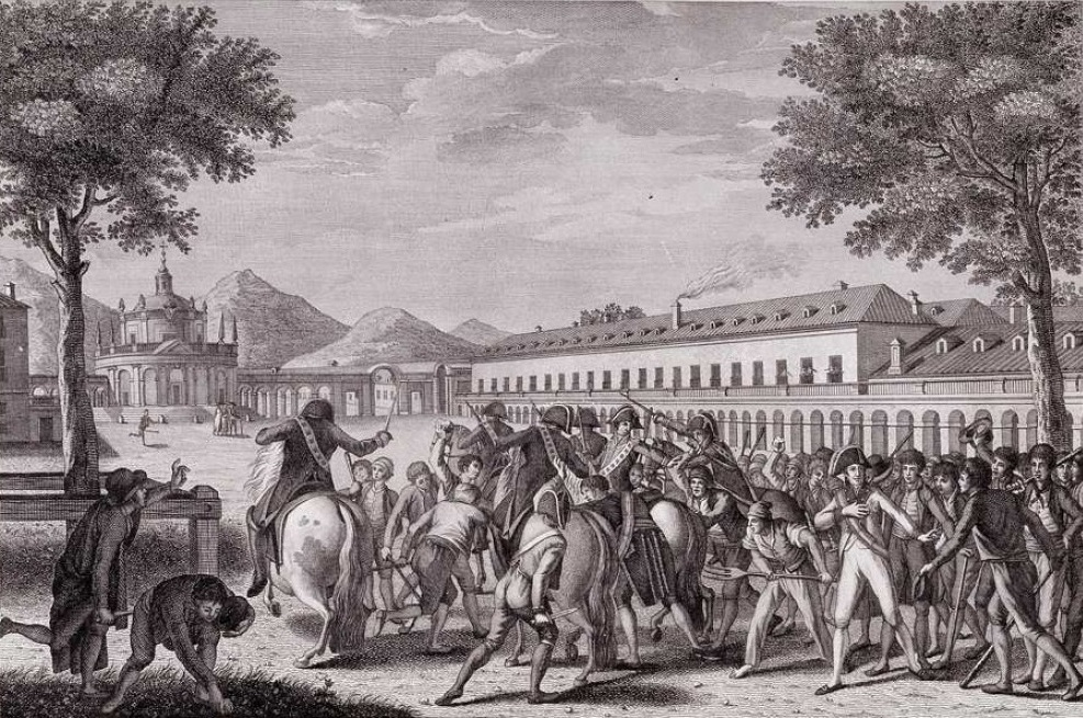 DIA 19. DE MARZO DE 1808. EN ARANJUEZ. / Caida y prision del Principe de la Paz / El pueblo sublevado corre á su casa y despues de haber practicado las mas eficaces diligencias le halla oculto en un desvan entre unas esteras. La algaraza y gritos de la muchedumbre anuncian á Carlos IV el riesgo de su favorito. Para socorrerle / envia al PRINCIPE FERNANDO, seguro de que el pueblo se contendria a su voz. Llega el PRINCIPE presuroso, y encarga á un esquadron de guardias de corps que le custodie. Mas ni esto ni el ir resguardado entre los caballos impide que el pueblo le arroje / piedras y procure ofenderle con palos, espadas y otros instrumentos que el furor y la casualidad le proporcionan. Resérvale la vida la promesa del PRINCIPE de que será castigado conforme merecieren sus delitos. No obstante llega preso al quartel de guardias de corps con quarenta y siete heridas.